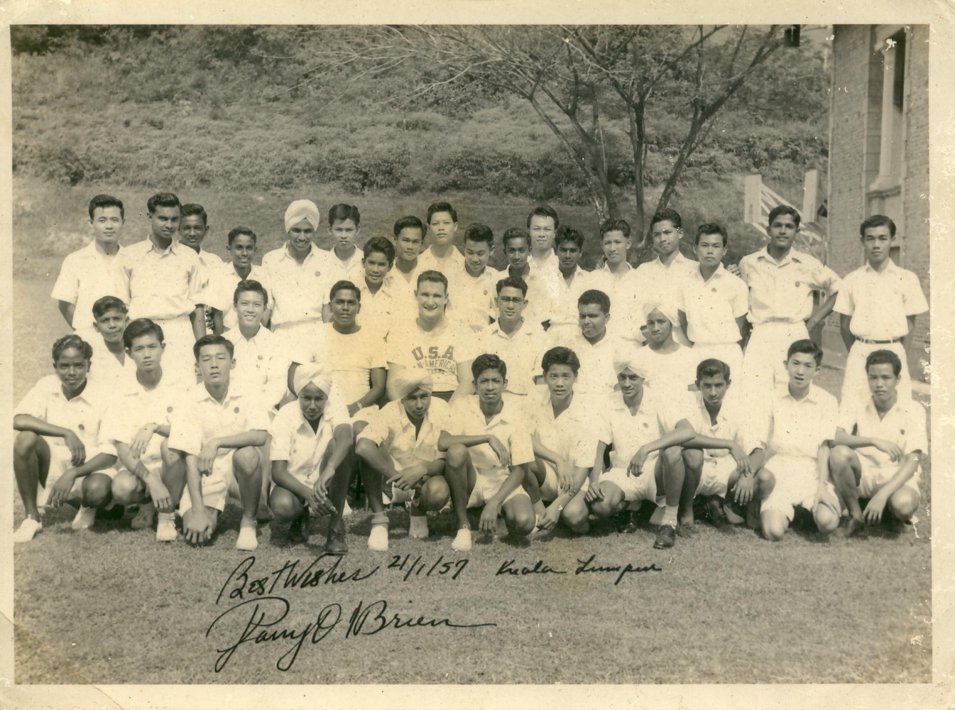 Maxwellian bersama Perry O' Brien, 1957